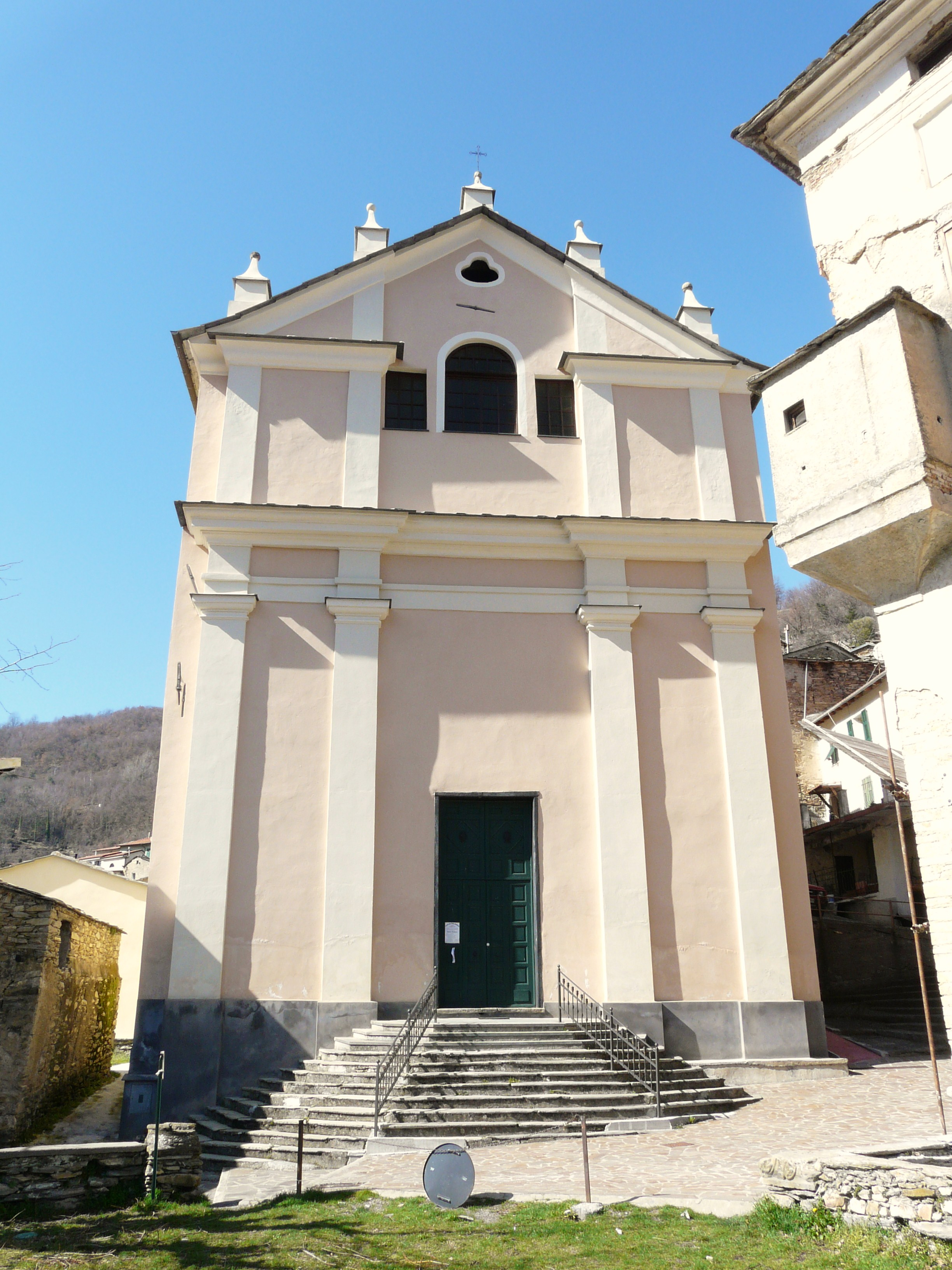 Chiesa di San Martino, Rezzo, Liguria, Italia